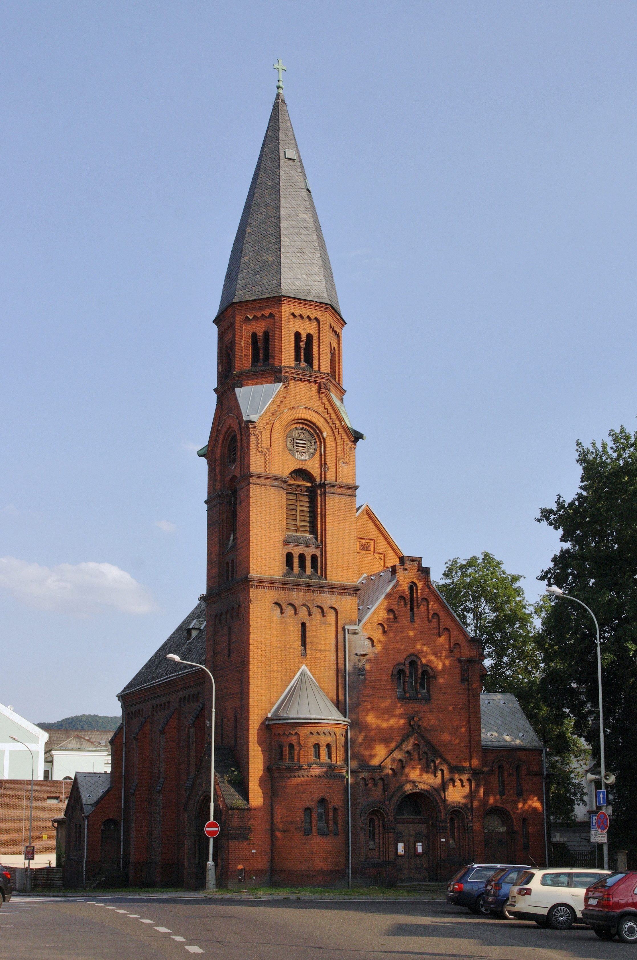 Ústí nad Labem - Kostel svatého Pavla, pohled od SZ